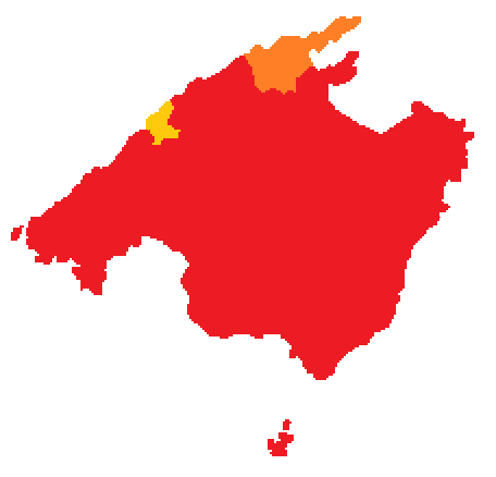 Variedades principales del mallorquín.